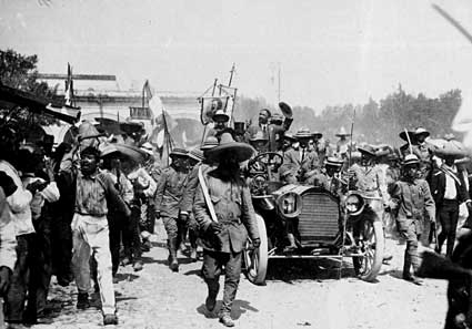 Fotografía de Francisco I. Madero entrando a la ciudad de Cuernavaca el es:12 de junio de es:1911. Al extremo derecho, con una banda tricolor cruzada al pecho aparece Emiliano Zapata. La imagen fue tomada de [1] y en los Estados Unidos se considera en el dominio público